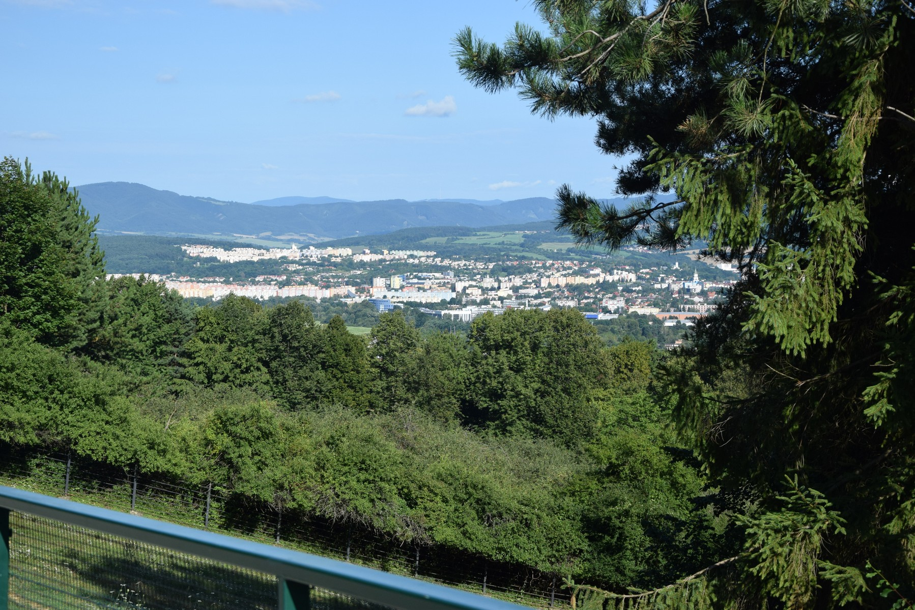 Pohľad z bojnickej ZOO